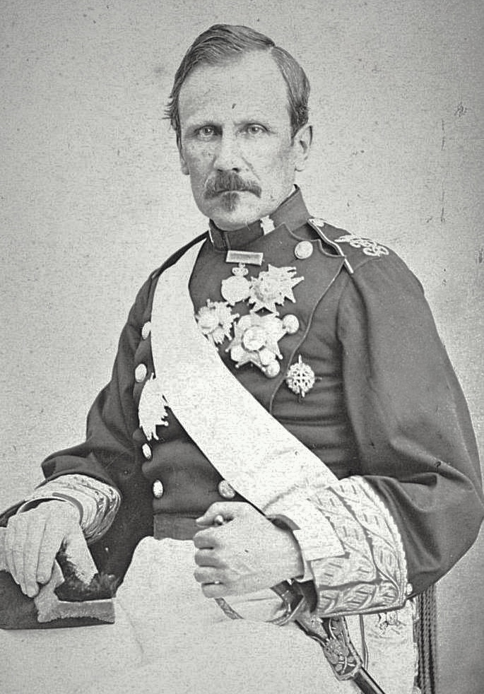 Retrato fotográfico de Rafael Echagüe y Bermingham This is a retouched picture, which means that it has been digitally altered from its original version. Modifications: Brightness and colour fixes using Photoshop..